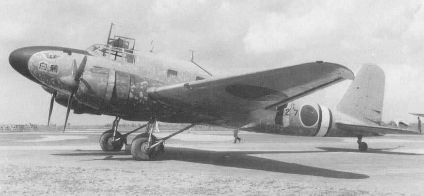 中華航空 「白鶴号」 MC-20-II of the China Airlines (中華航空股份有限公司), which was in service during the Sino-Japanese war. Unrelated to the current 'China Airlines' (中華航空公司) of the republic of China.